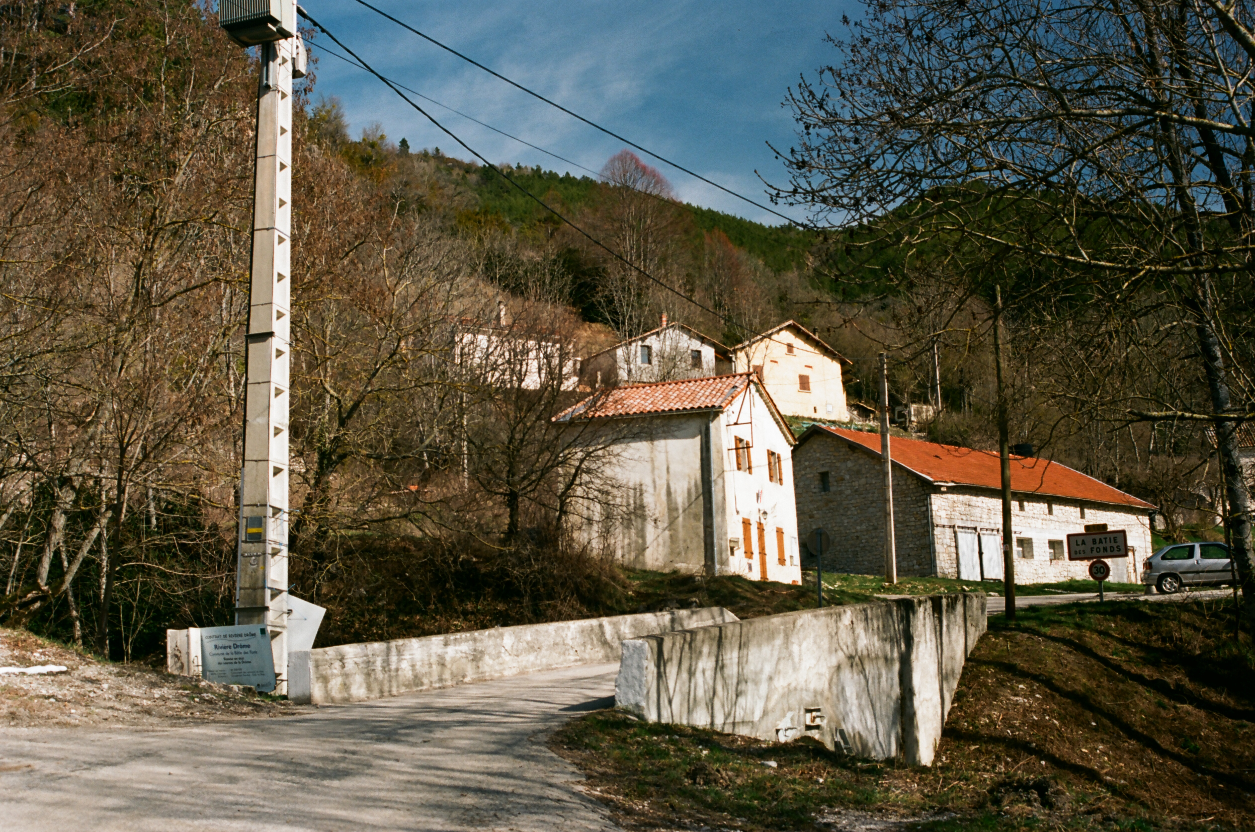 Restes du village de La Bâtie des Fonds